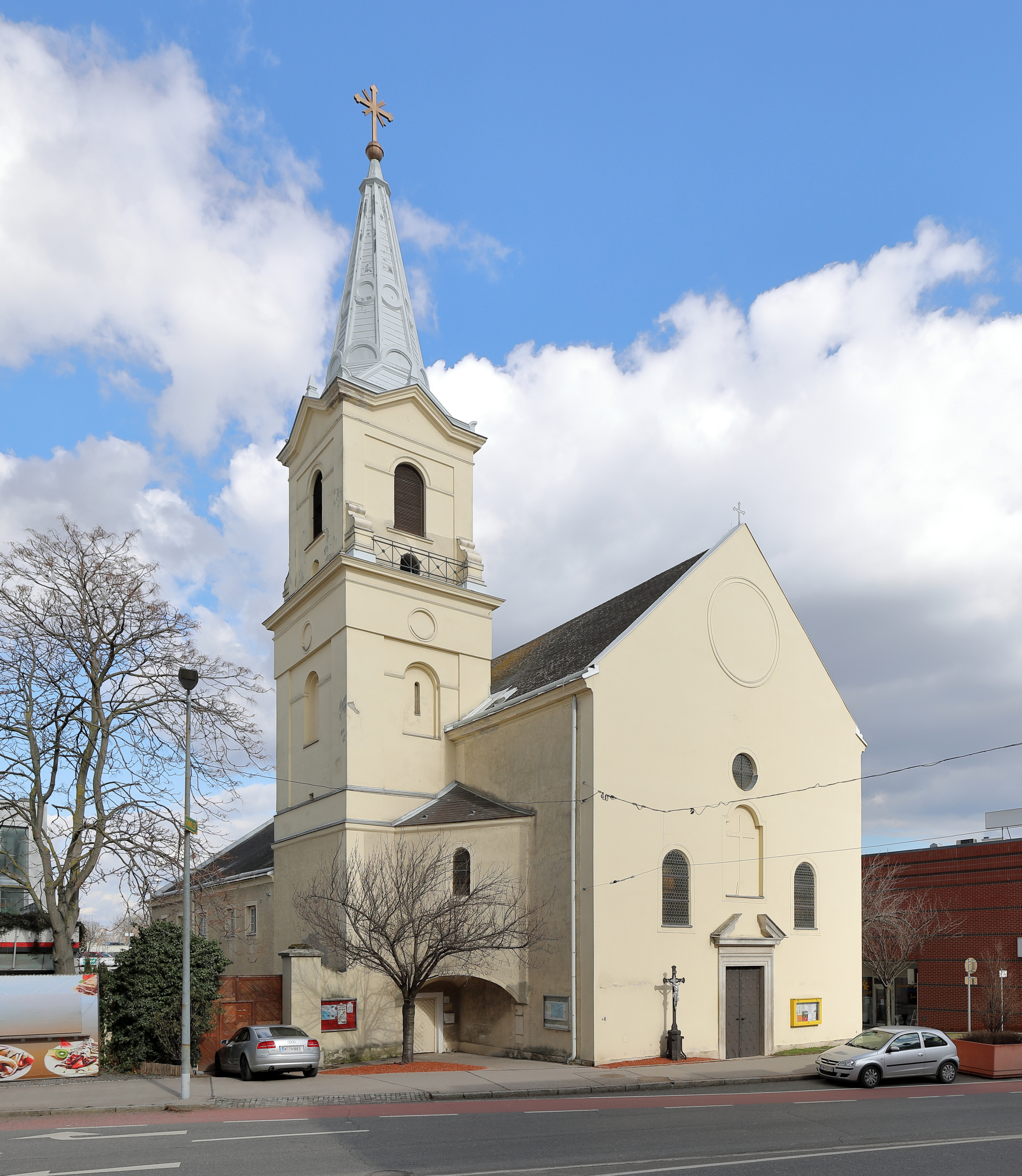 Westansicht der röm.-kath. Filialkirche hl. Dreifaltigkeit und ehemalige Kapuzinerkirche in der niederösterreichischen Stadtgemeinde Schwechalt.Die barocke Saalkirche wurde von 1694 bis 1697 errichtet. 1843 erfolgte der Neubau des Turmes, der 1885 erhöht wurde.